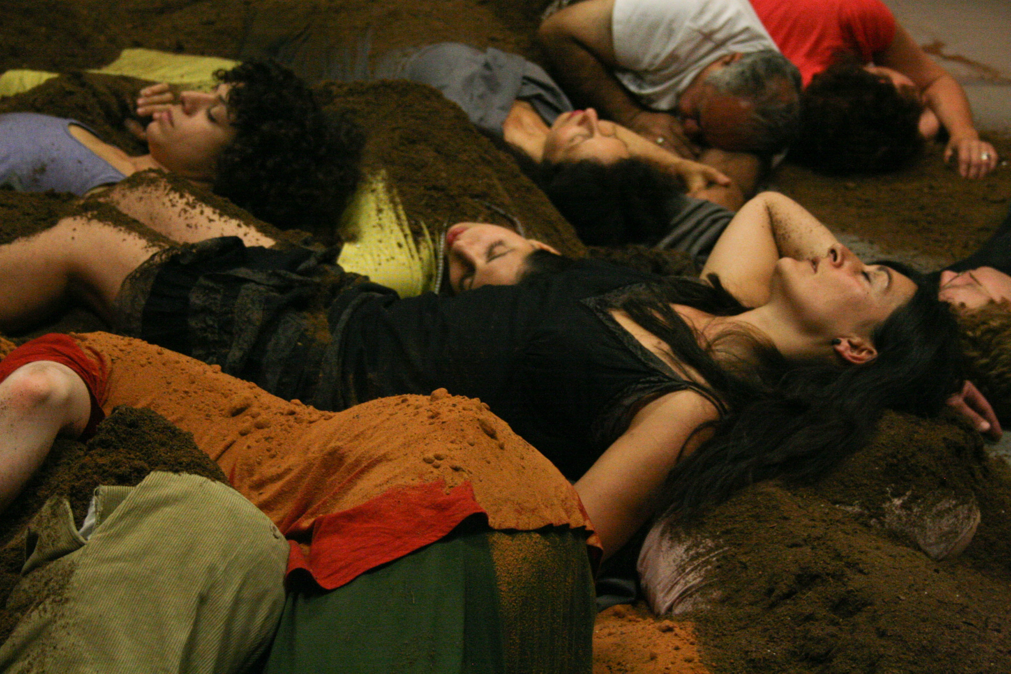 המיצג The future of death של a2company